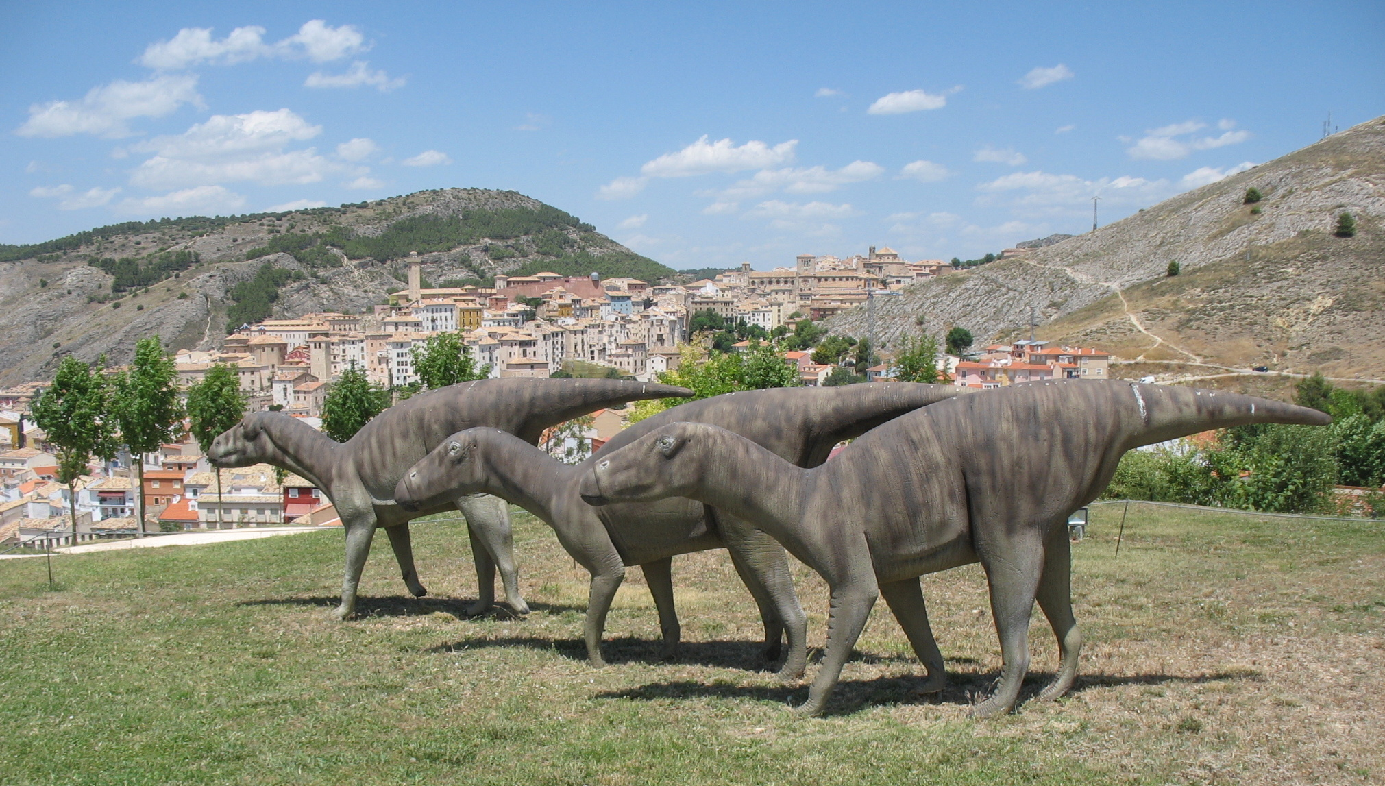 Figuras de Iguanodon bernissartensis - Museo Paleontológico de Castilla-La Mancha (Cuenca)